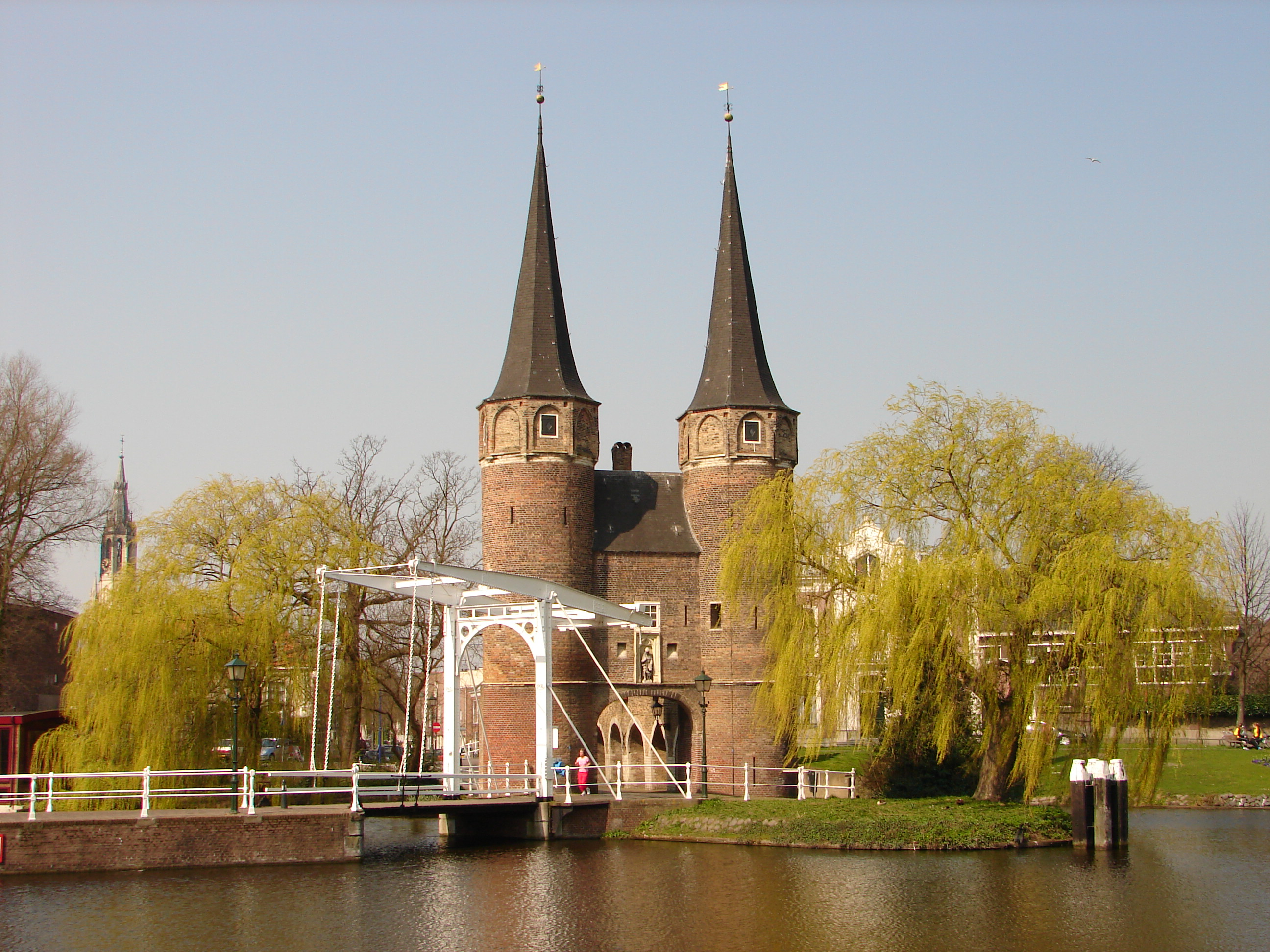 De Oostpoort te Delft